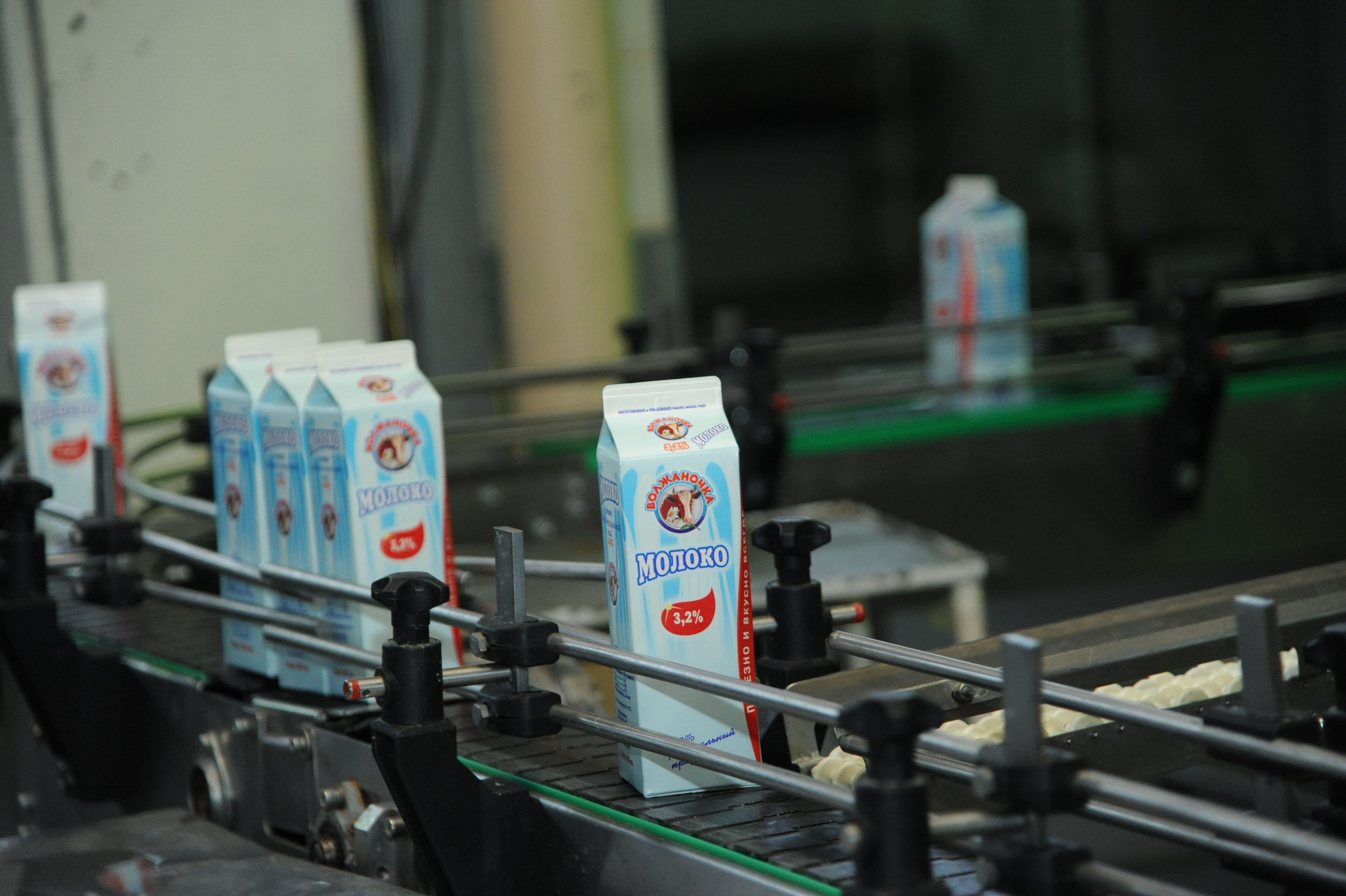 Конвейерная лента на молочном заводе в Волжском